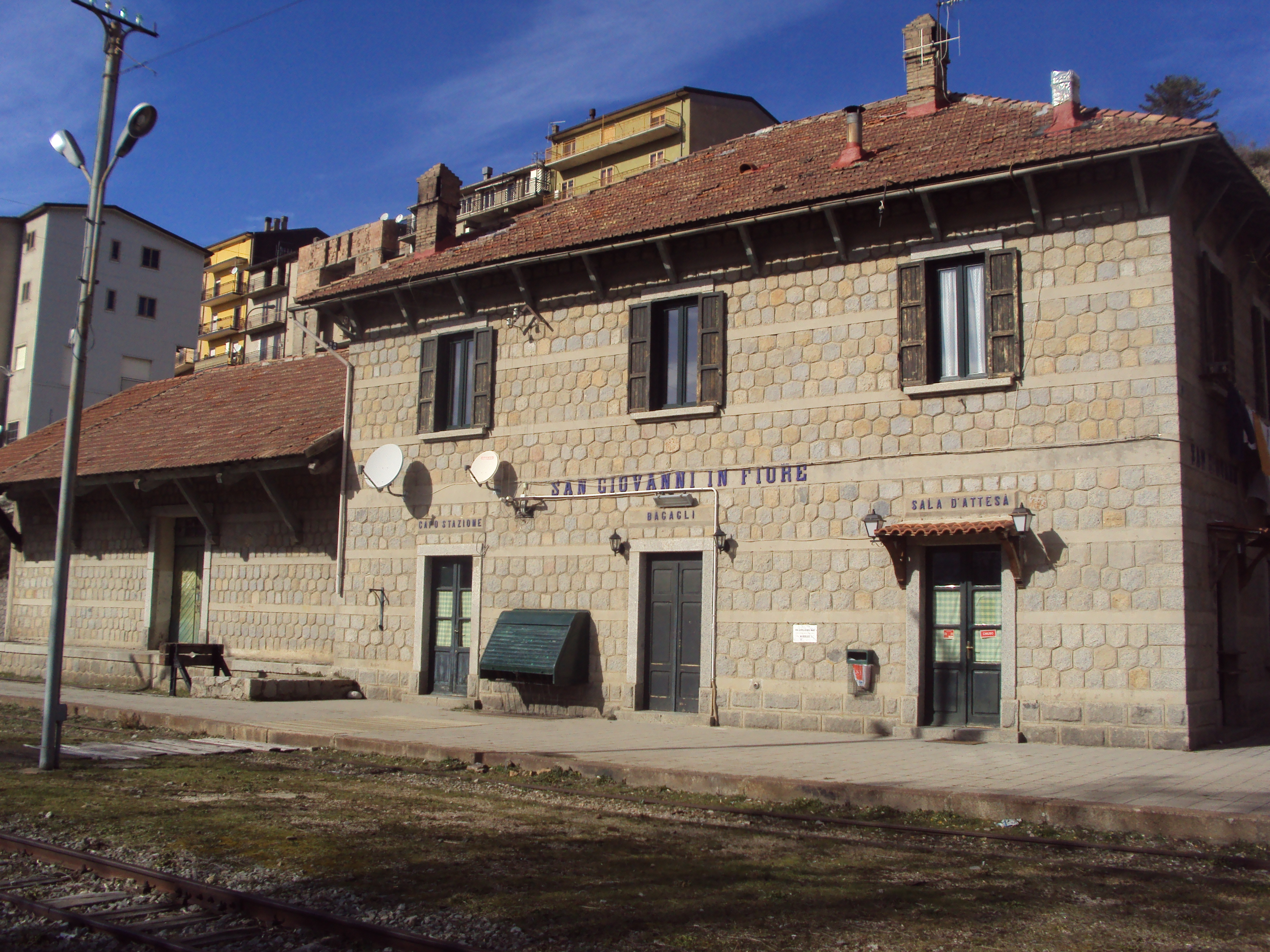 Stazione di San Giovanni in Fiore FCL